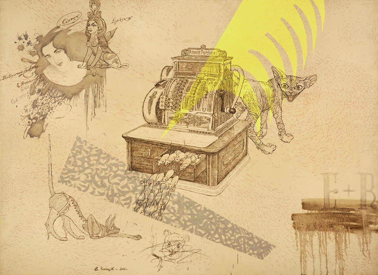 SPHINX. Холст, масло, 200Х150 см. 2016 г